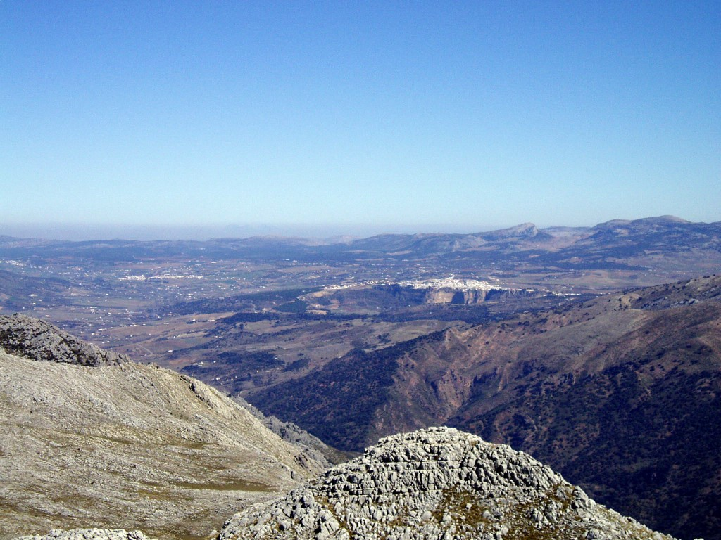 Depresión de Ronda, Málaga, España.